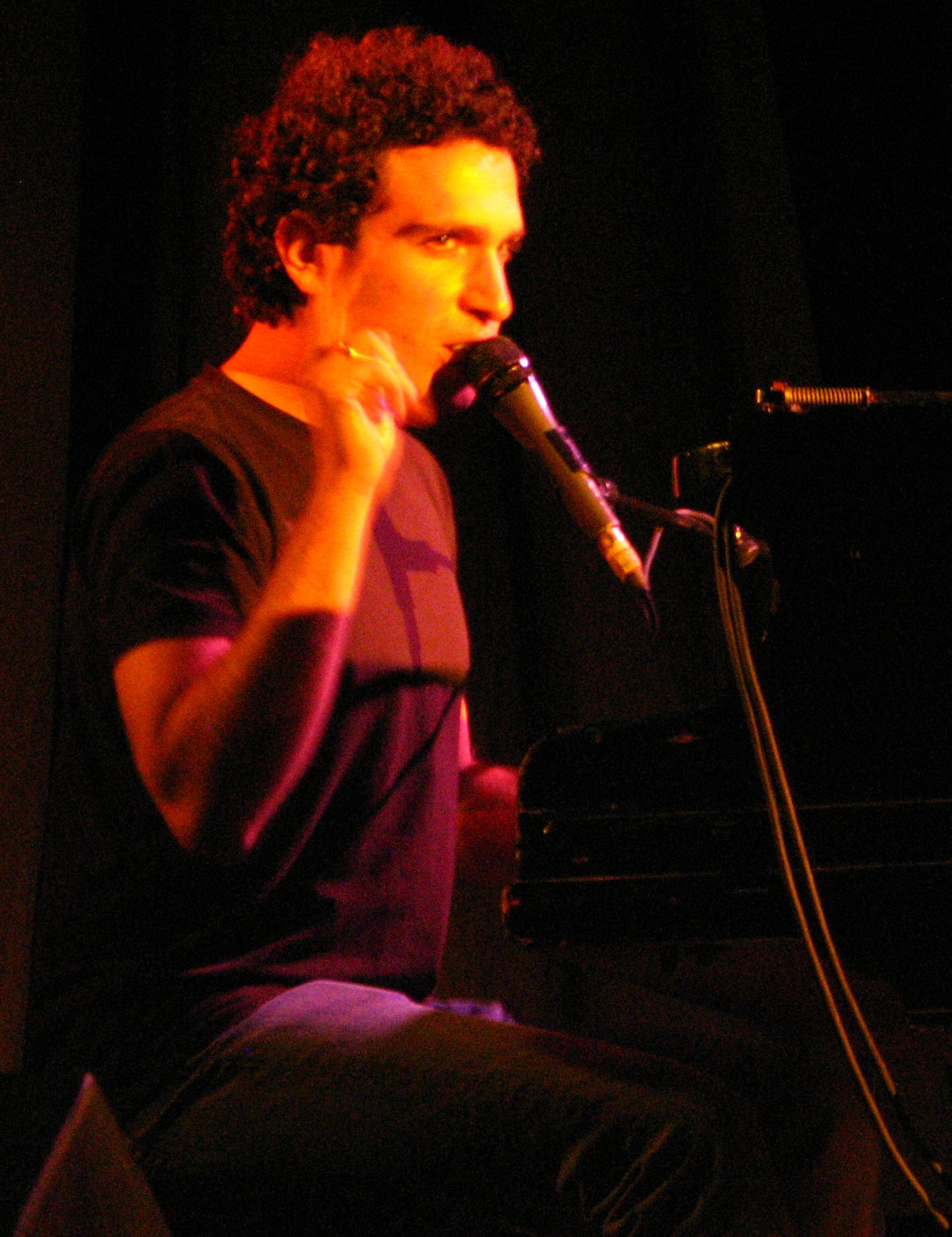 שלומי שבן בהופעה בכברי, 5 ביוני 2006. צולם על ידי חי.